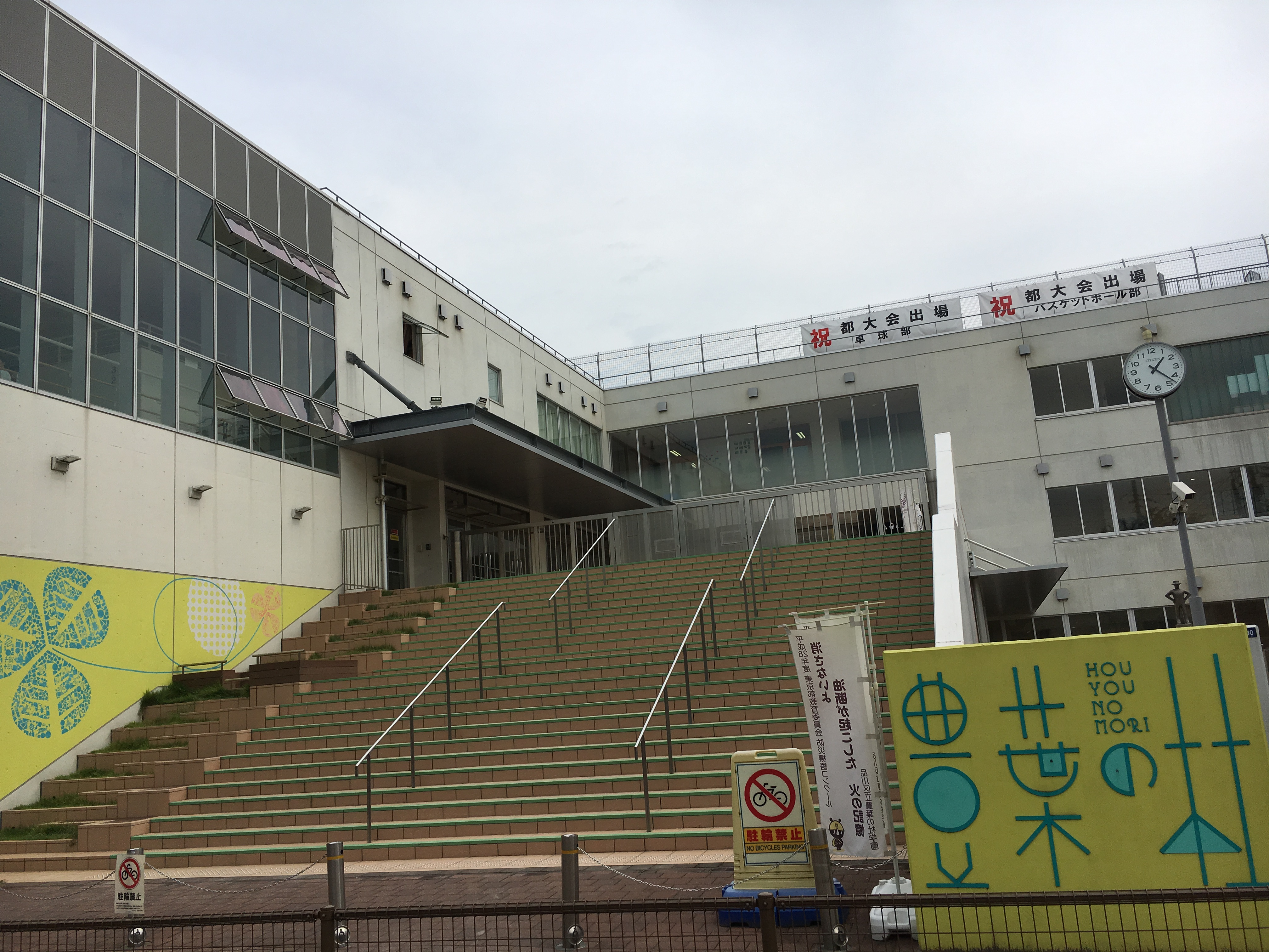 2014年2月14日に東京都内で降雪時に品川区立豊葉の杜学園付近を撮影